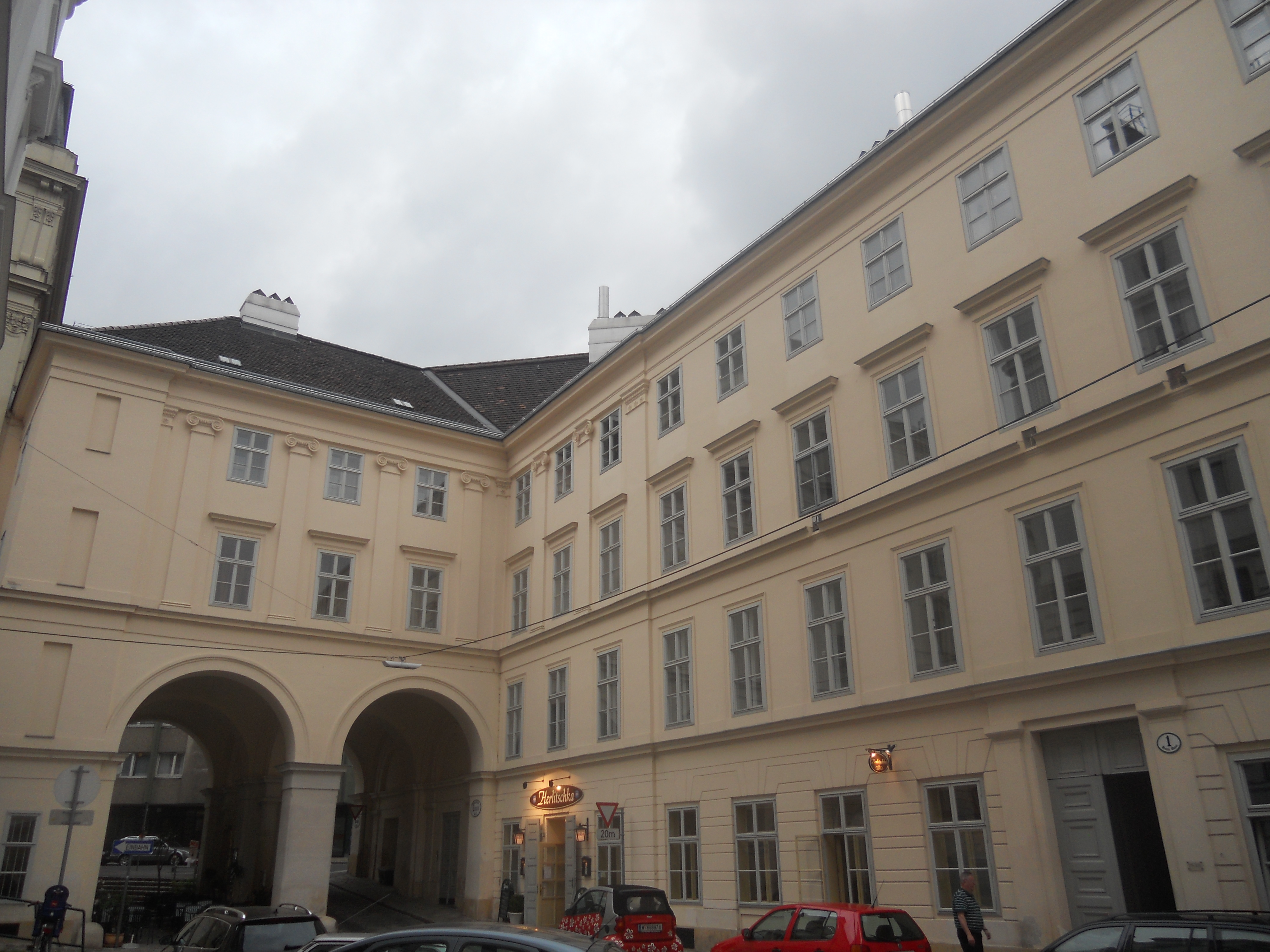 Das "Traunsche Haus", Traungasse 1 in Wien